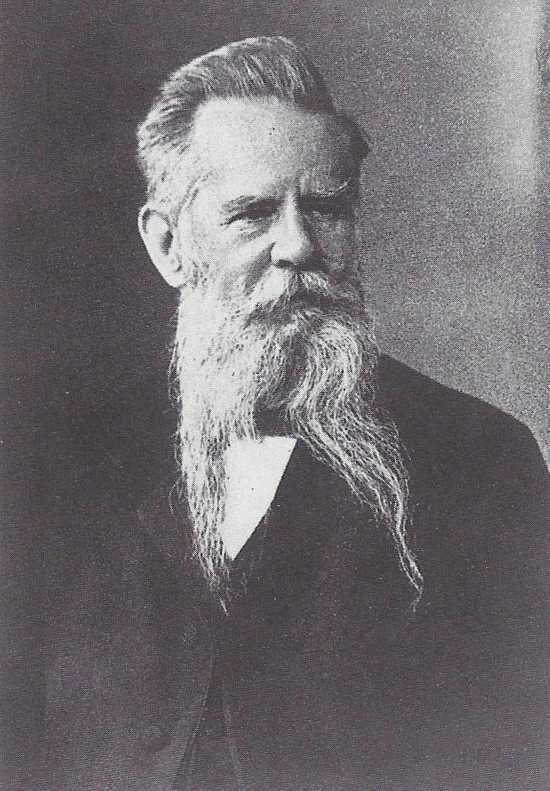 Porträtfotografie des Königsberger Orthopäden Heinrich Hoeftman (1851–1917).